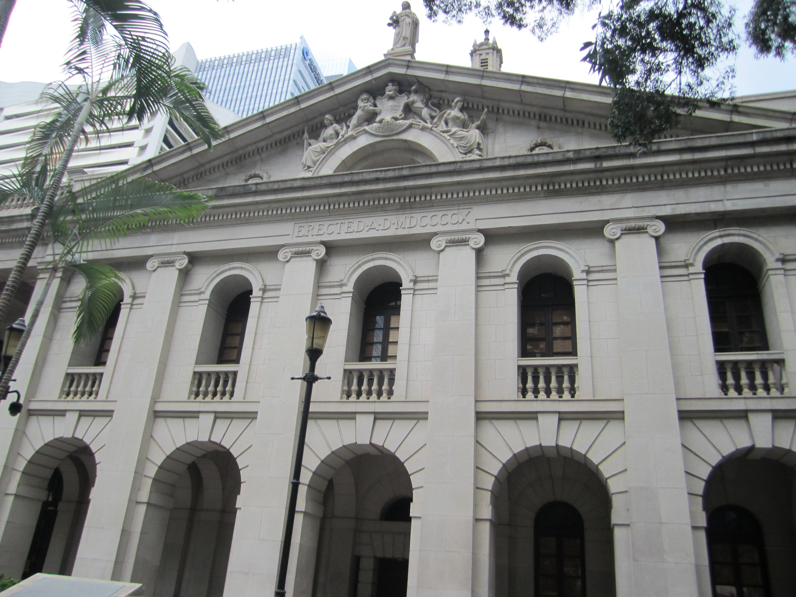 中文（台灣）: 舊最高法院外部